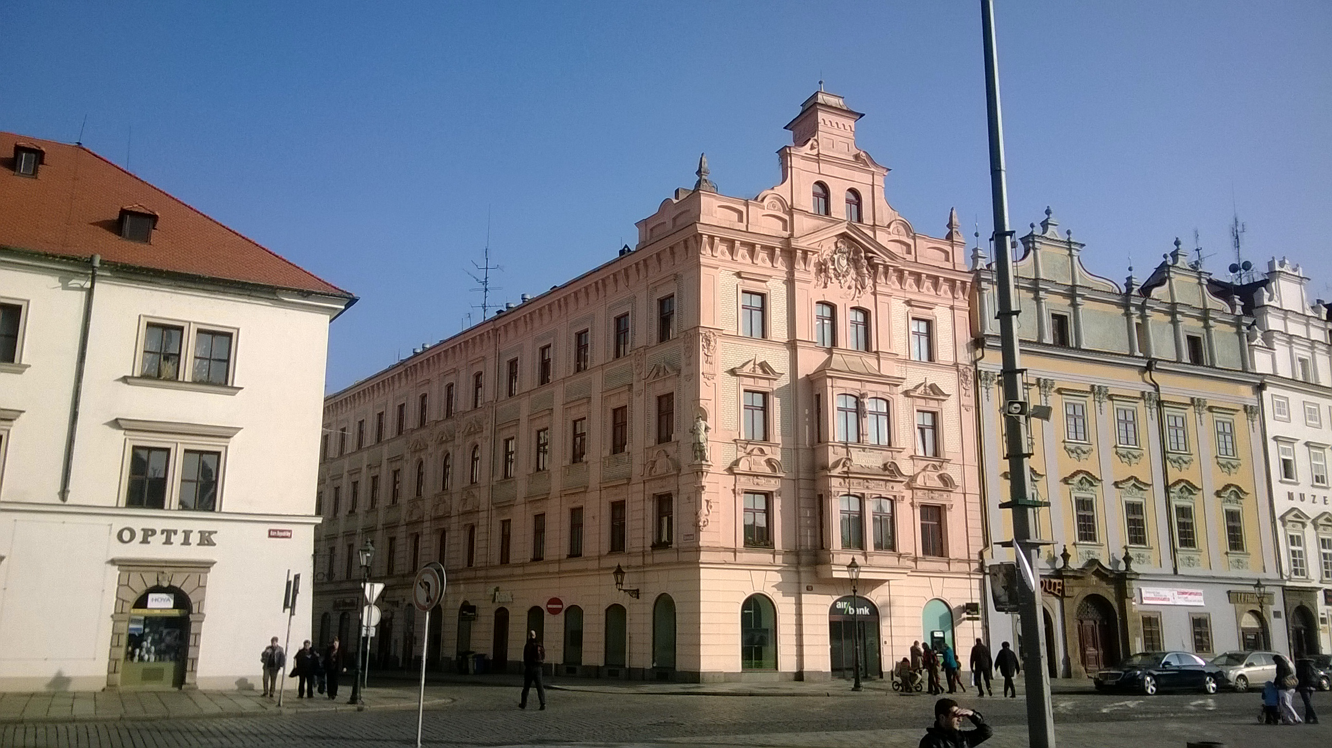 Dům U Zlatého Růžence v Plzni